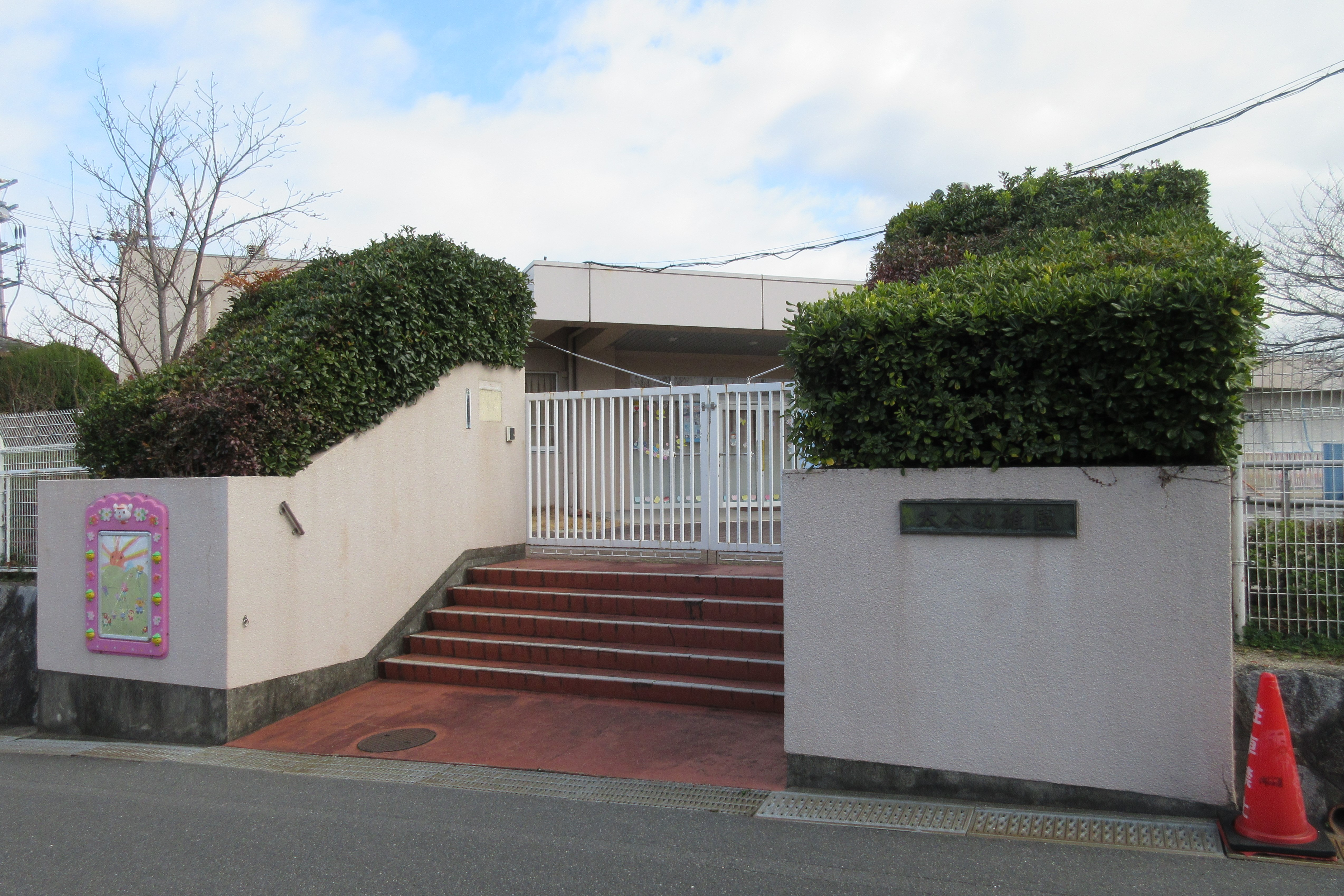 富田林市の大谷幼稚園